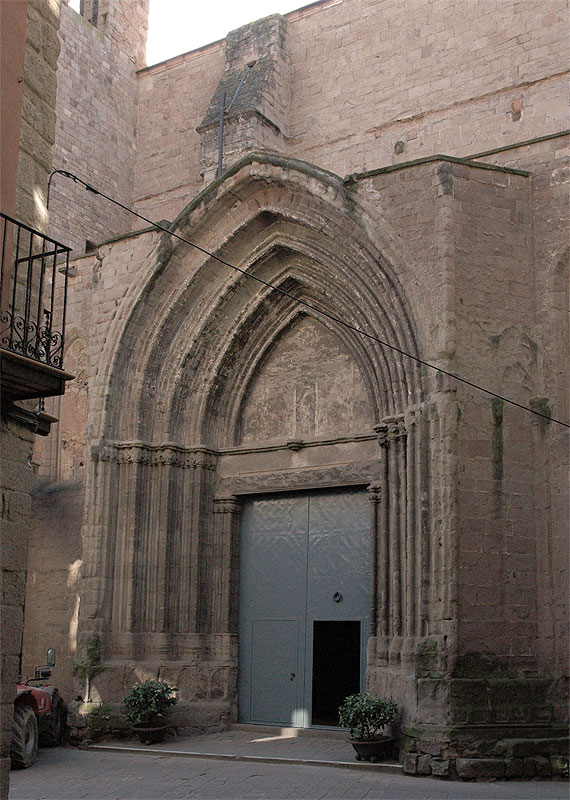 Portada de l'església de Sant Miquel de Cardona. Cardona, Bages (Catalunya, Espanya)